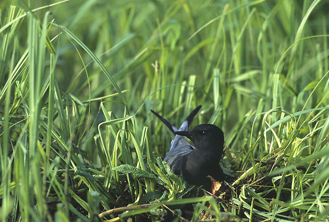 Chlidonias niger